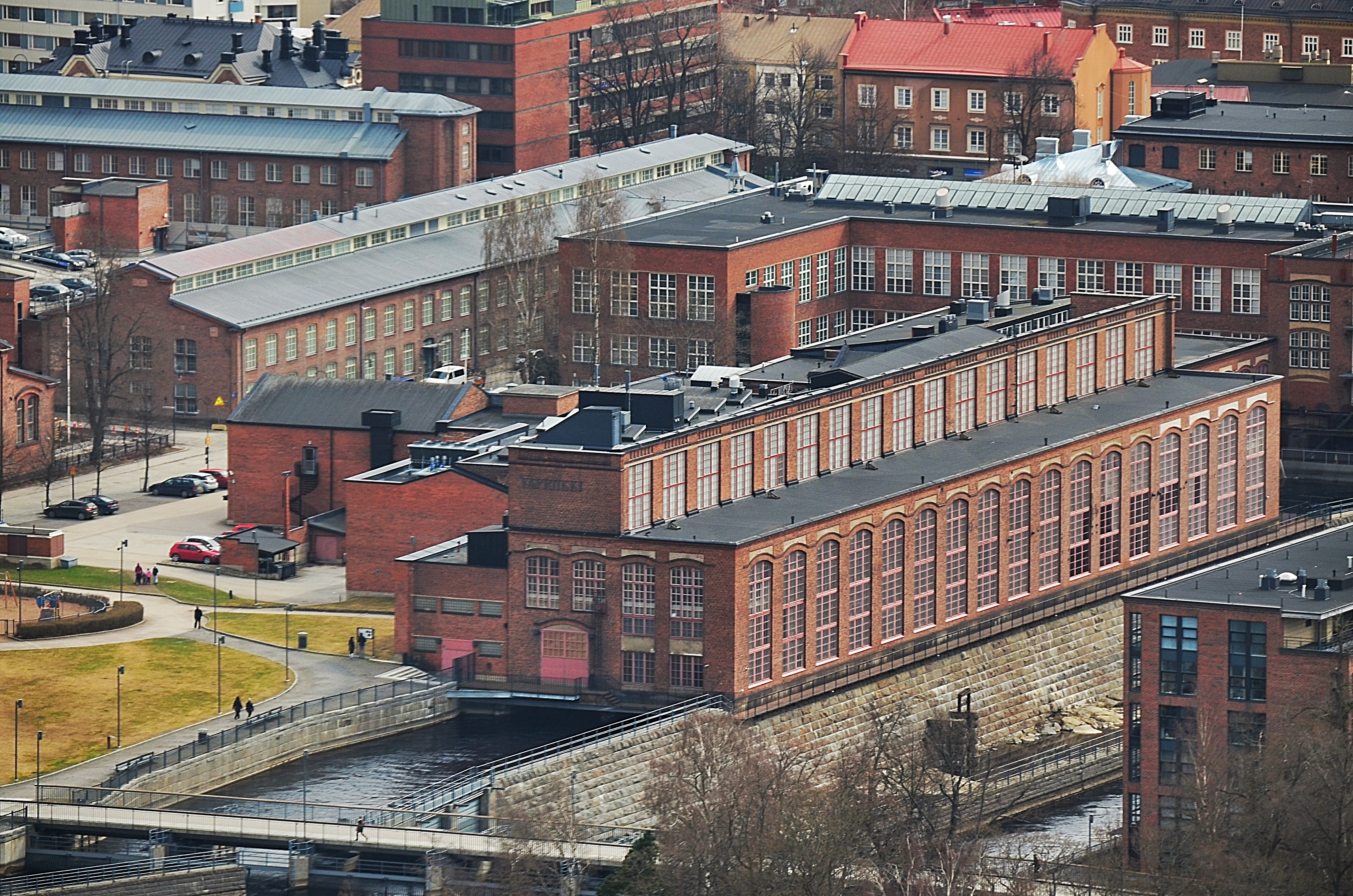 Tampellan masuuni